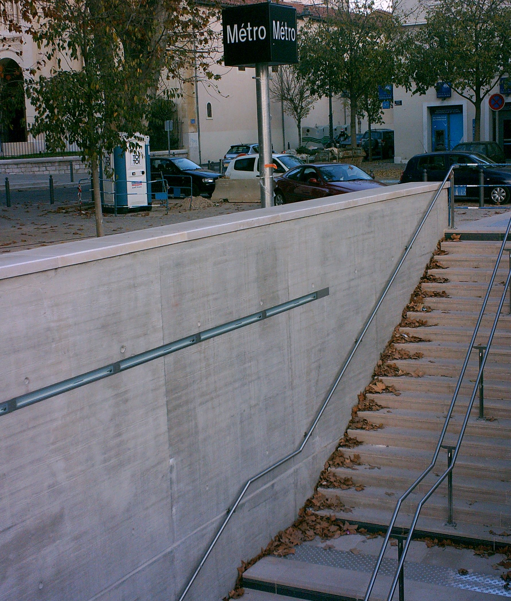 Station Saint Barnabé peu de temps avant l'inauguration.